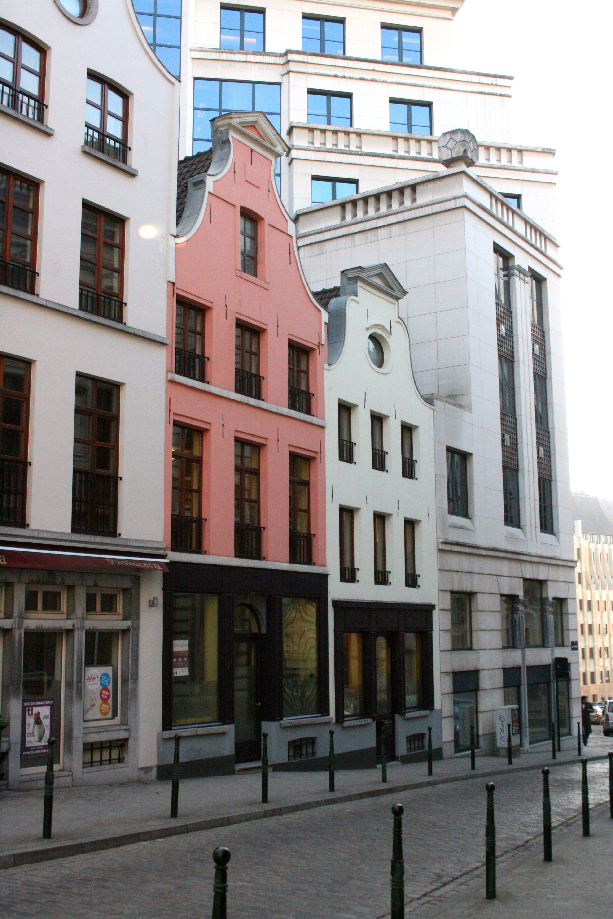 Treurenberg, Bruxelles (Belgique)